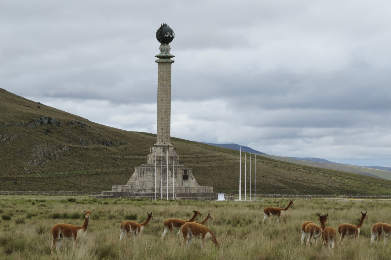 Vicuñas cerca del Monumento a los Vencedores de Junín